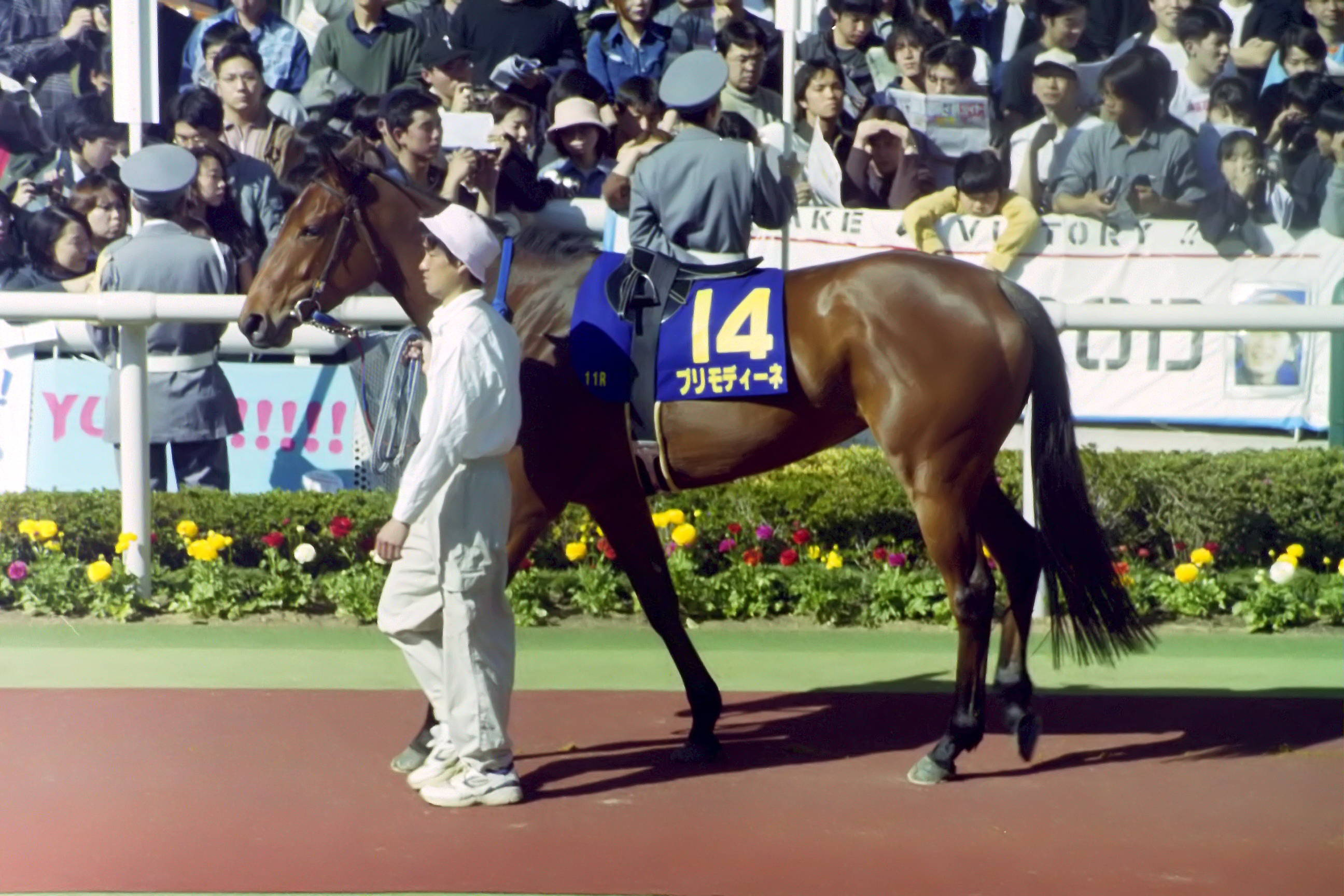 プリモディーネ号